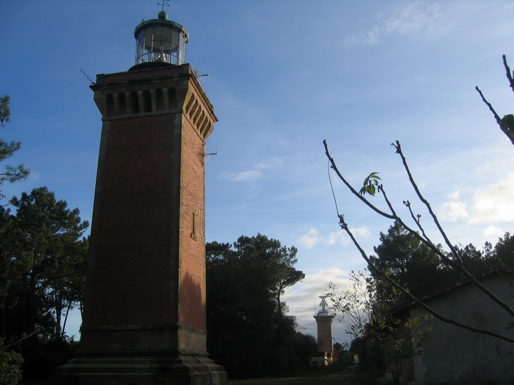 Les phares sur a dune d'Hourtin